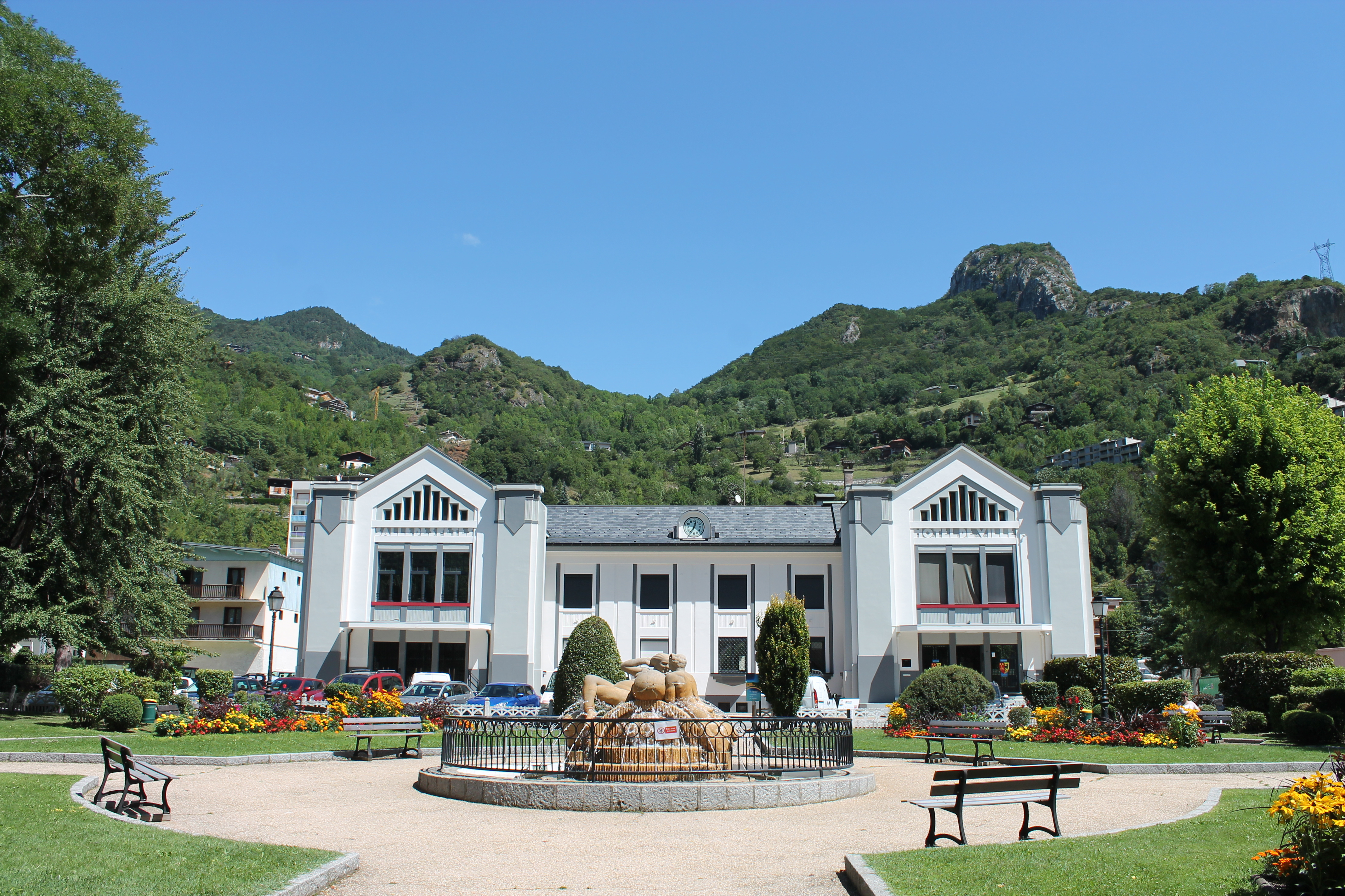 Hôtel de ville de Moûtiers et jardin.